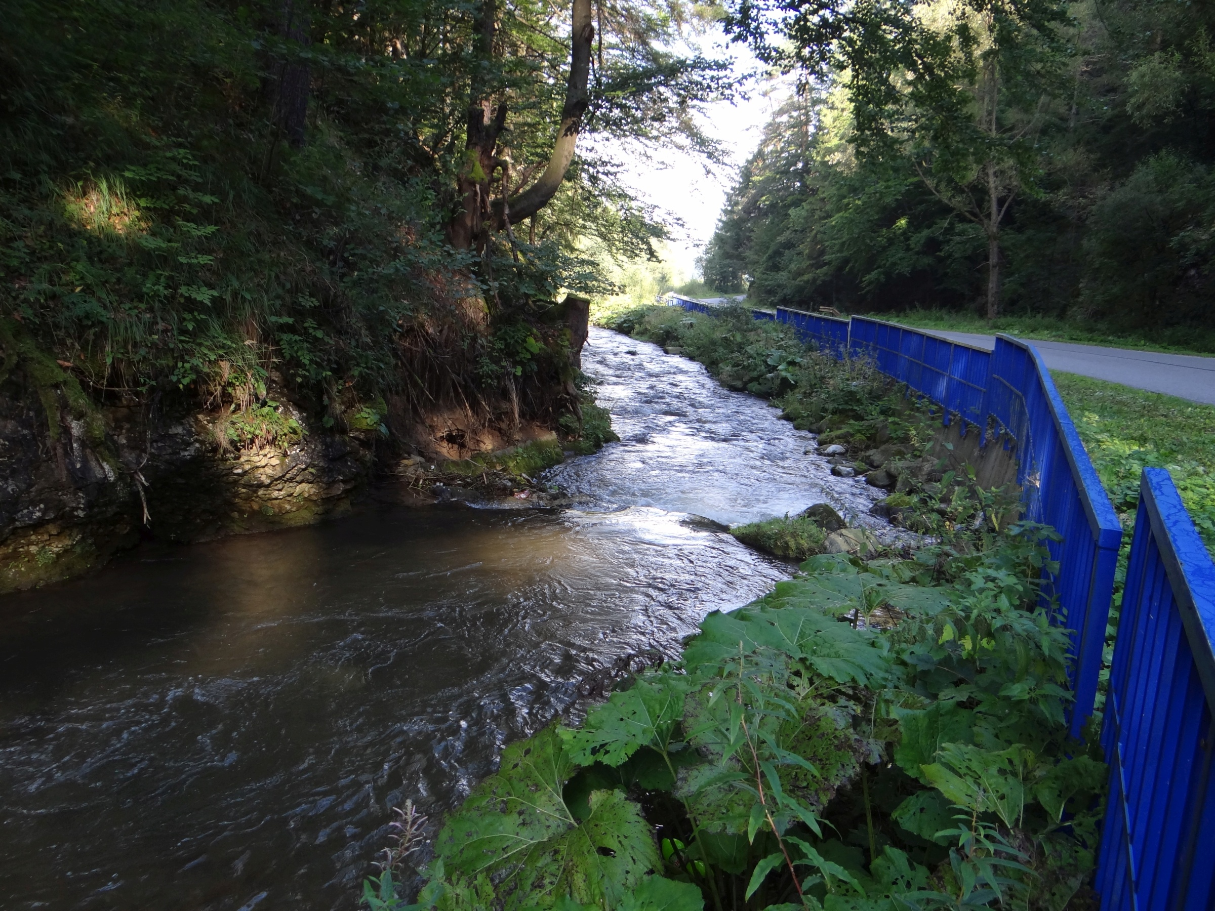 Lúžňanka